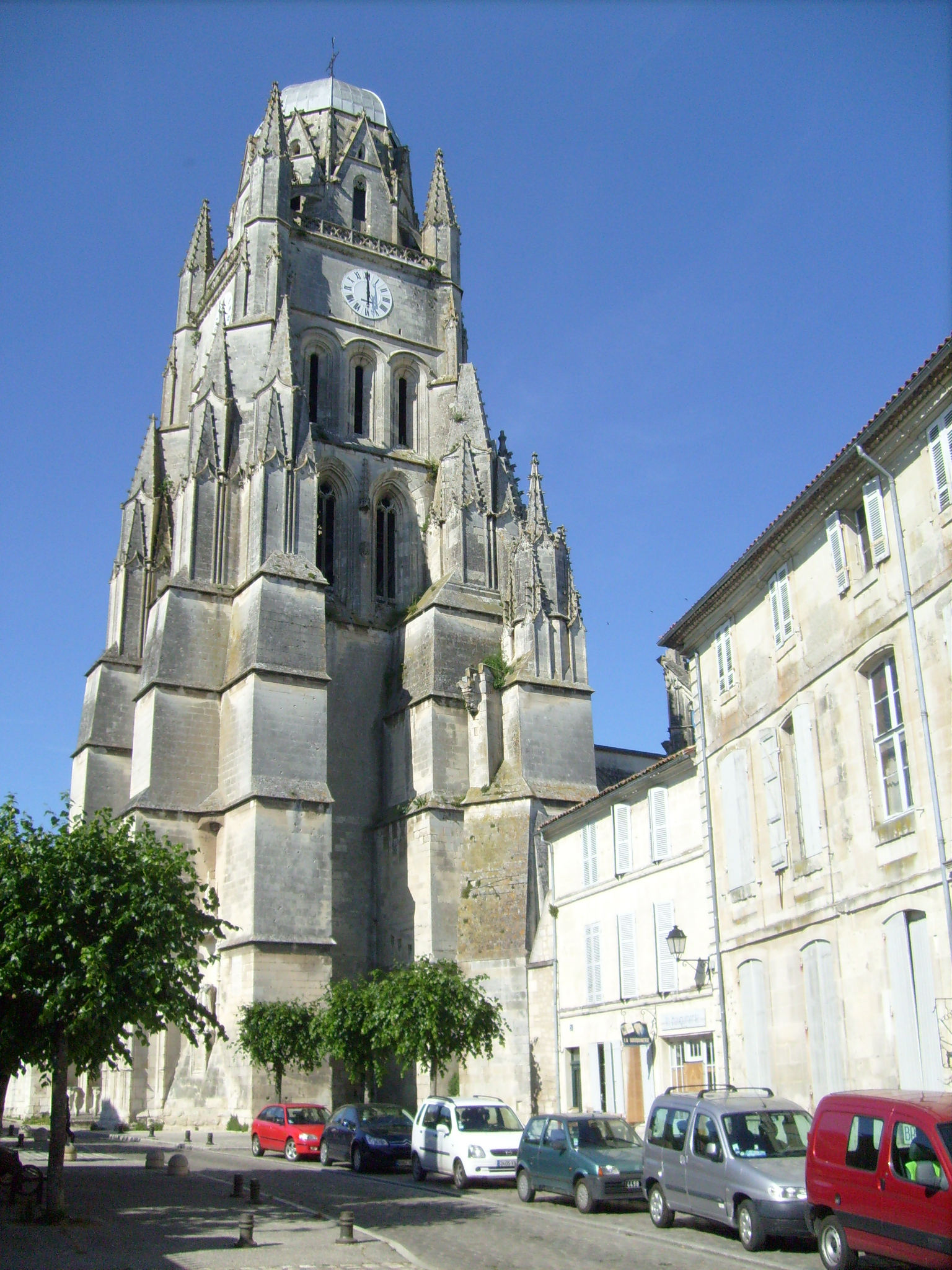 Clocher de la cathédrale Saint-Pierre de Saintes